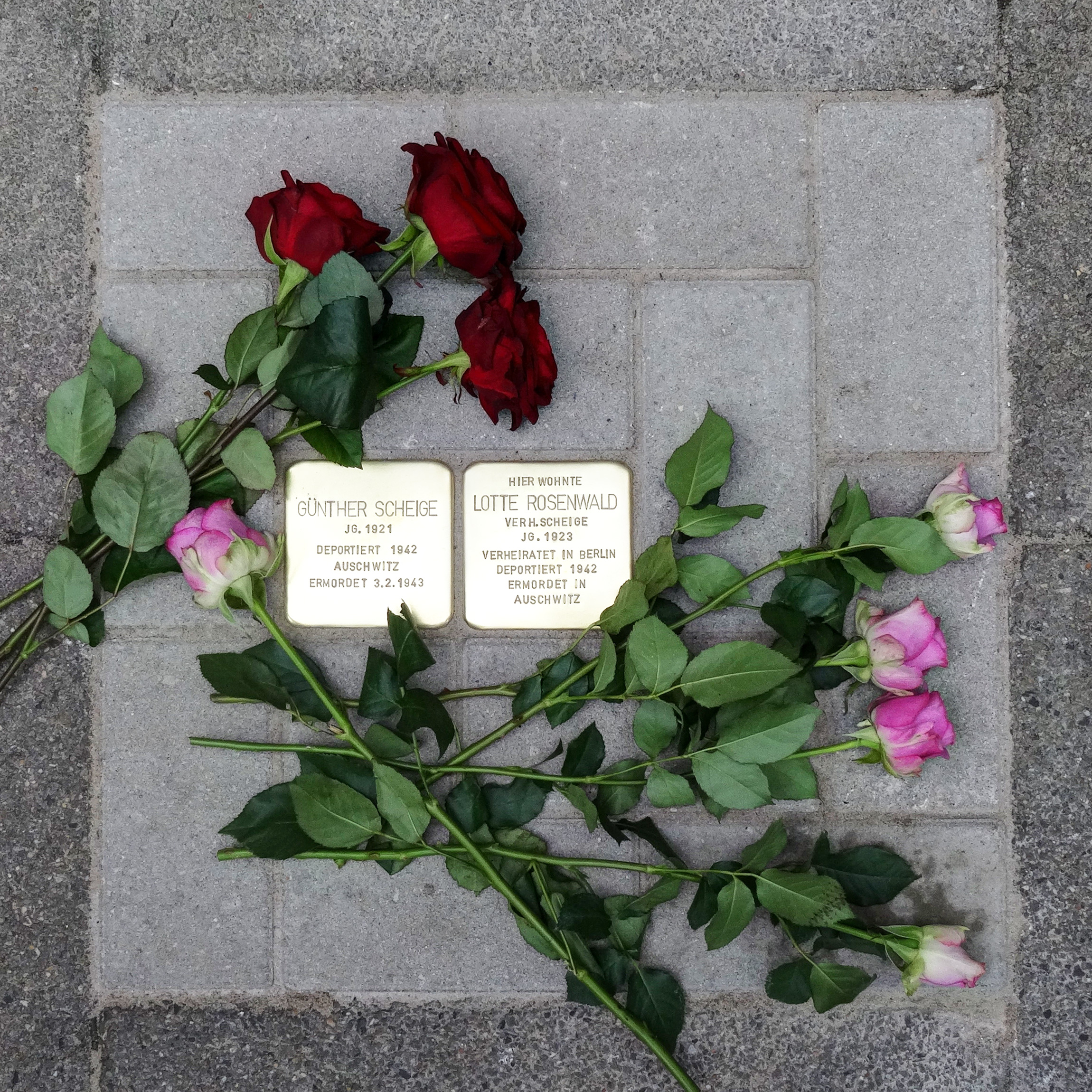 Stolperstein HB-Hamburger Strasse 10: Scheige - Rosenwald